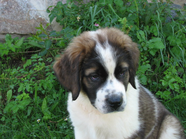 Slika mladega bernardinca.